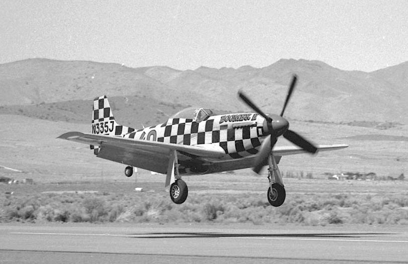 Reno69-1